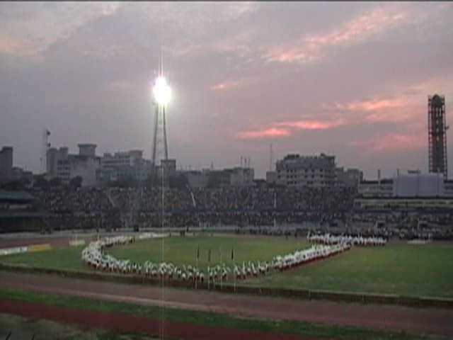 Bangabandhu National Stadium